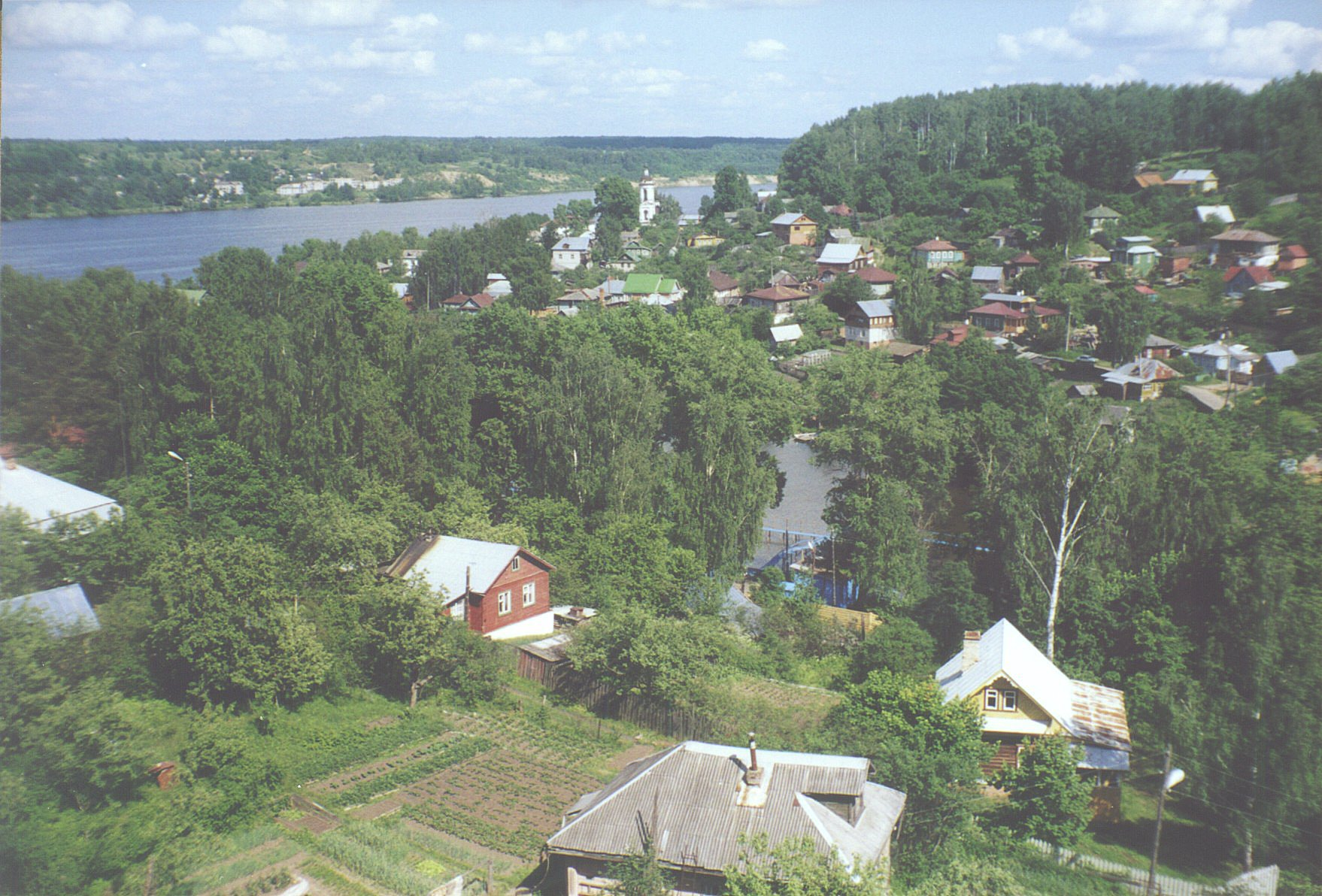 eo Urbo Plos (2005). ru Город Плёс (2005). La fonta bildo de cxi tiu bildo estas ankaux en mia propra retpagxaro [1] Mi, auxtoro de la bildo, permesas al cxiuj uzi gxin kun cxi tiuj kondicxoj